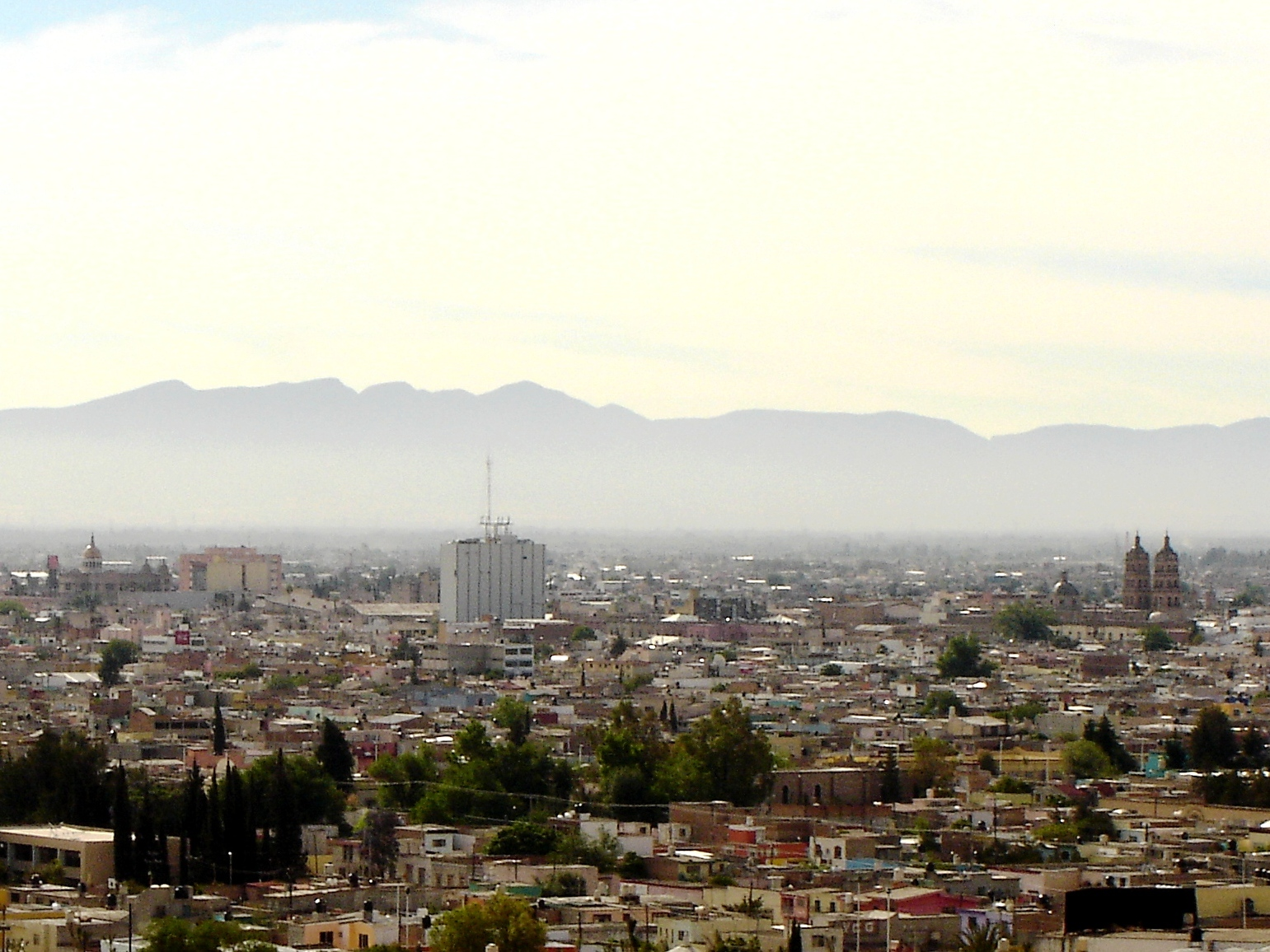 Panorámica de la ciudad de Durango desde el lado norte de la misma, se observan en la parte central de izquierda a derecha: Templo del Sagrado Corazón de Jesús, Hospital General, Edificio de Telmex y Catedral Basílica Menor